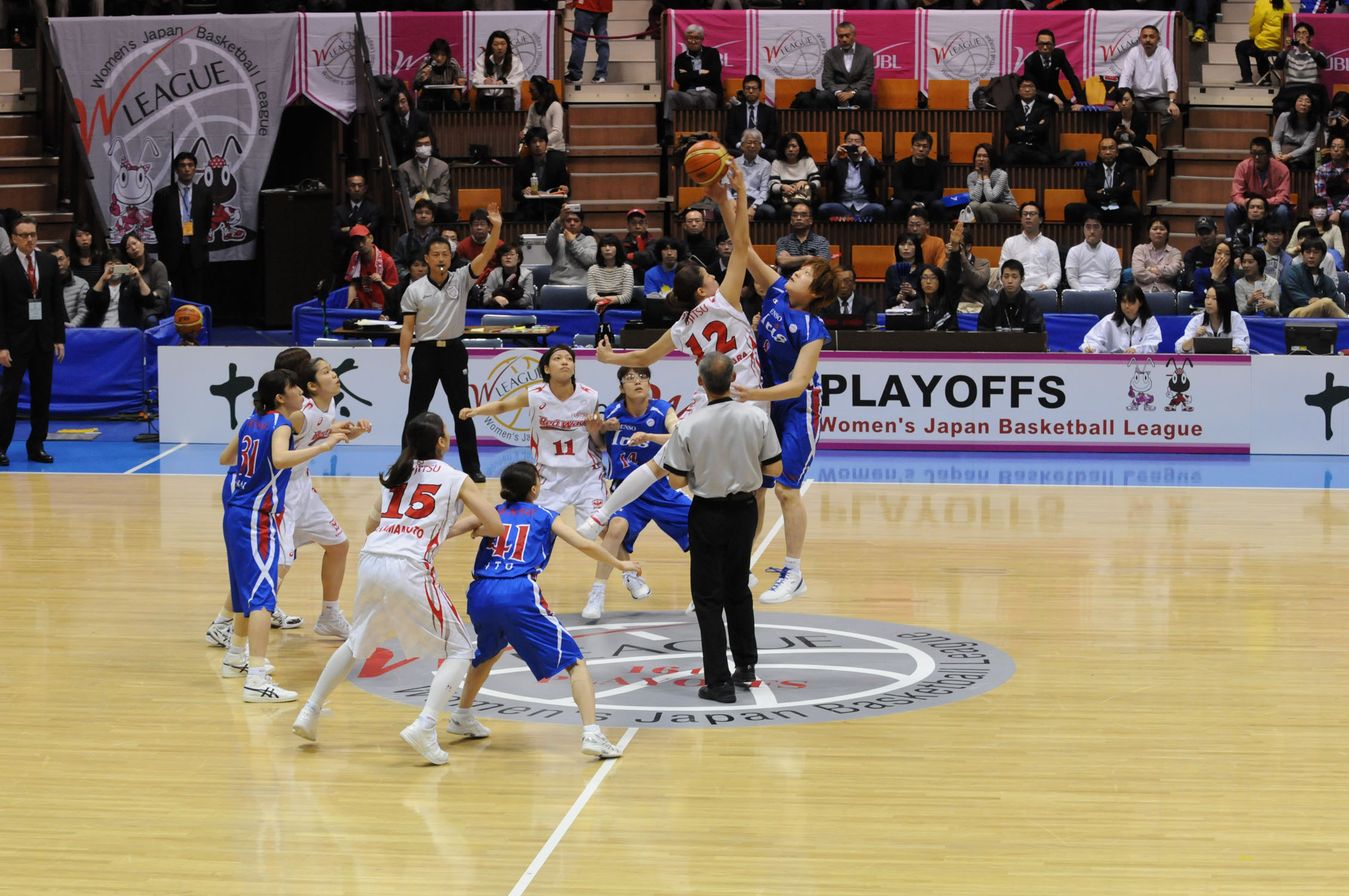 WJBL 14-15プレーオフセミファイナル、富士通対デンソー。代々木第二体育館で。